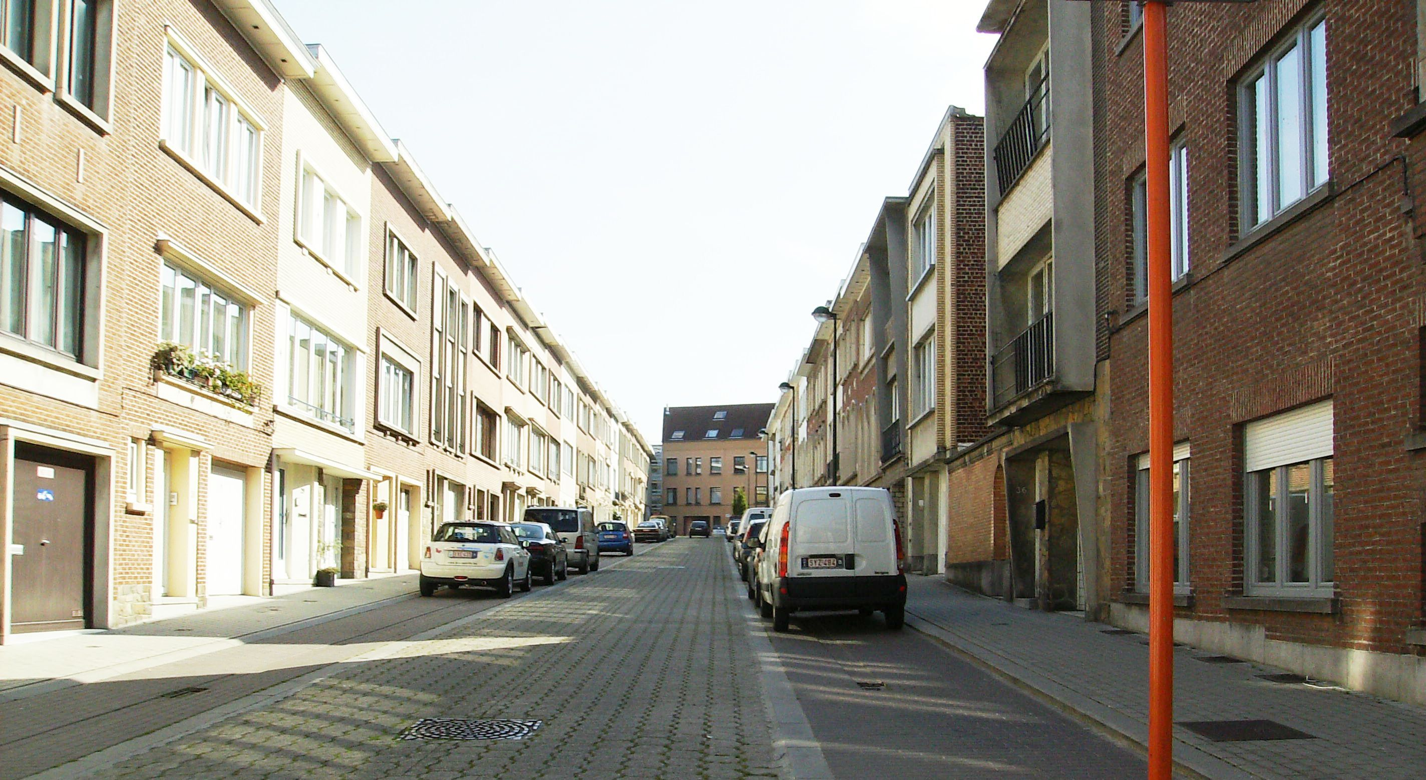 rue de la Molignée Auderghem